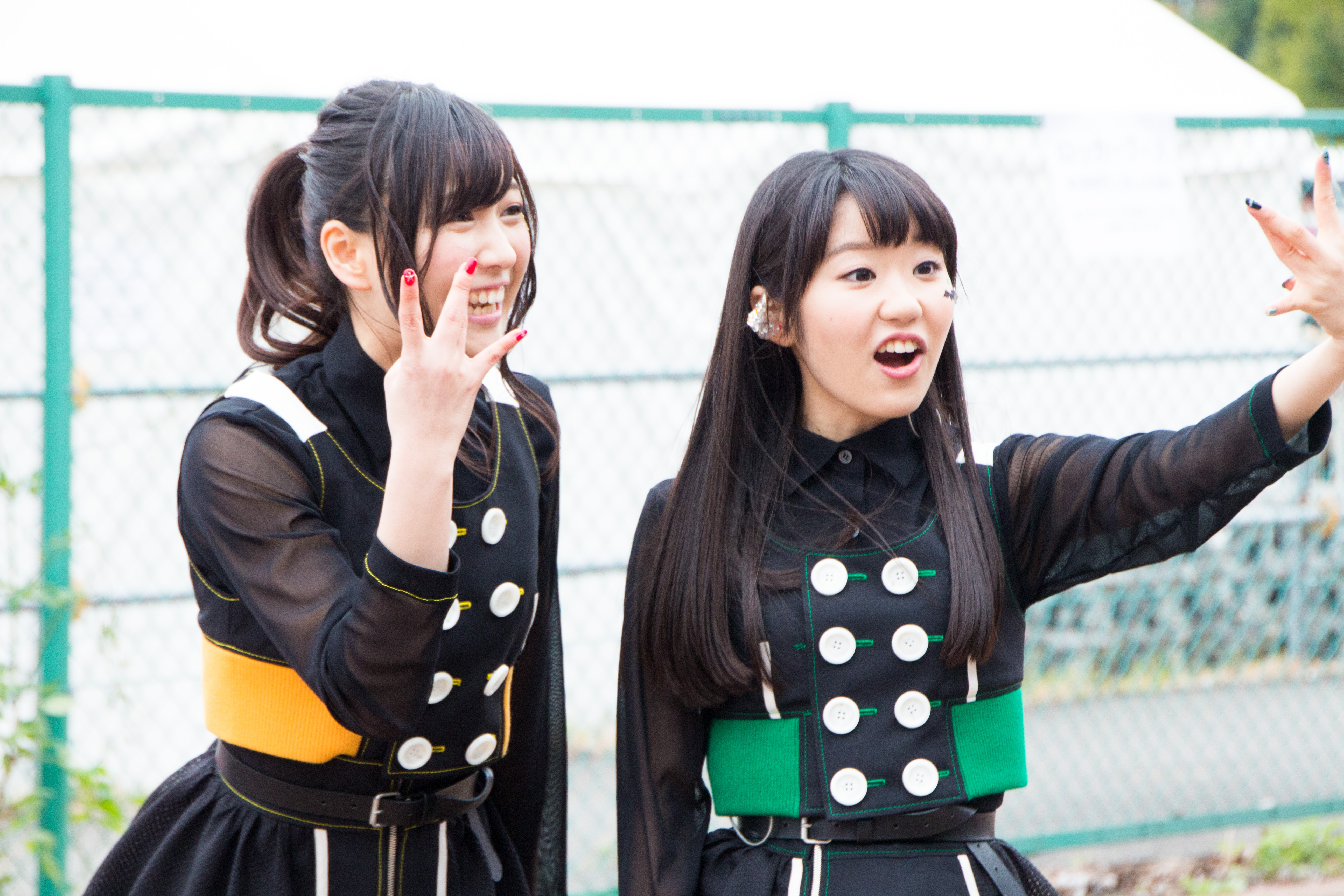 T-SPOOK 2016 安野希世乃 東山奈央 (ワルキューレ)